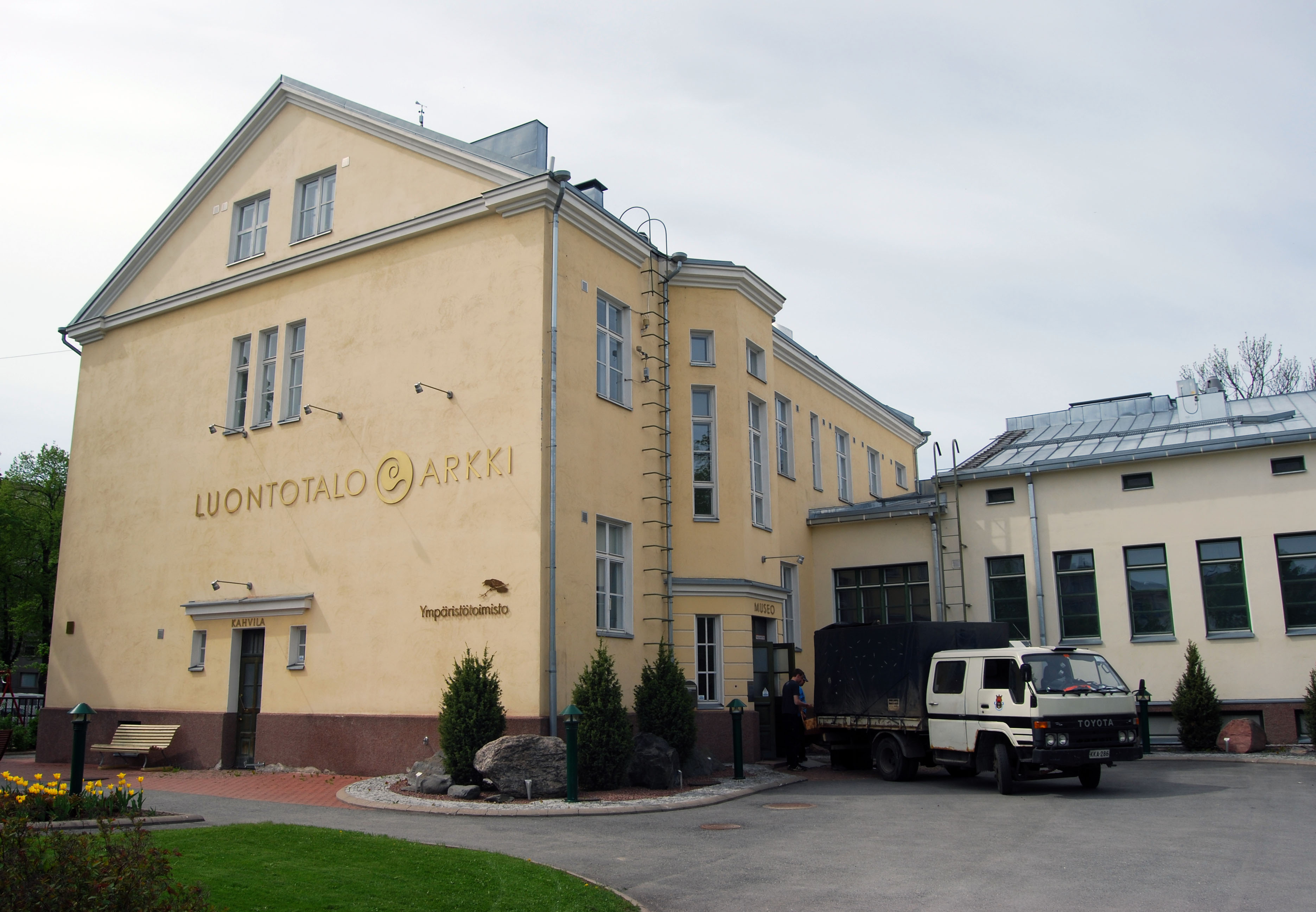 Luontotalo Arkki Porissa.